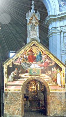 Santa Maria degli Angeli (Assisi - Italy) - La Porziuncola